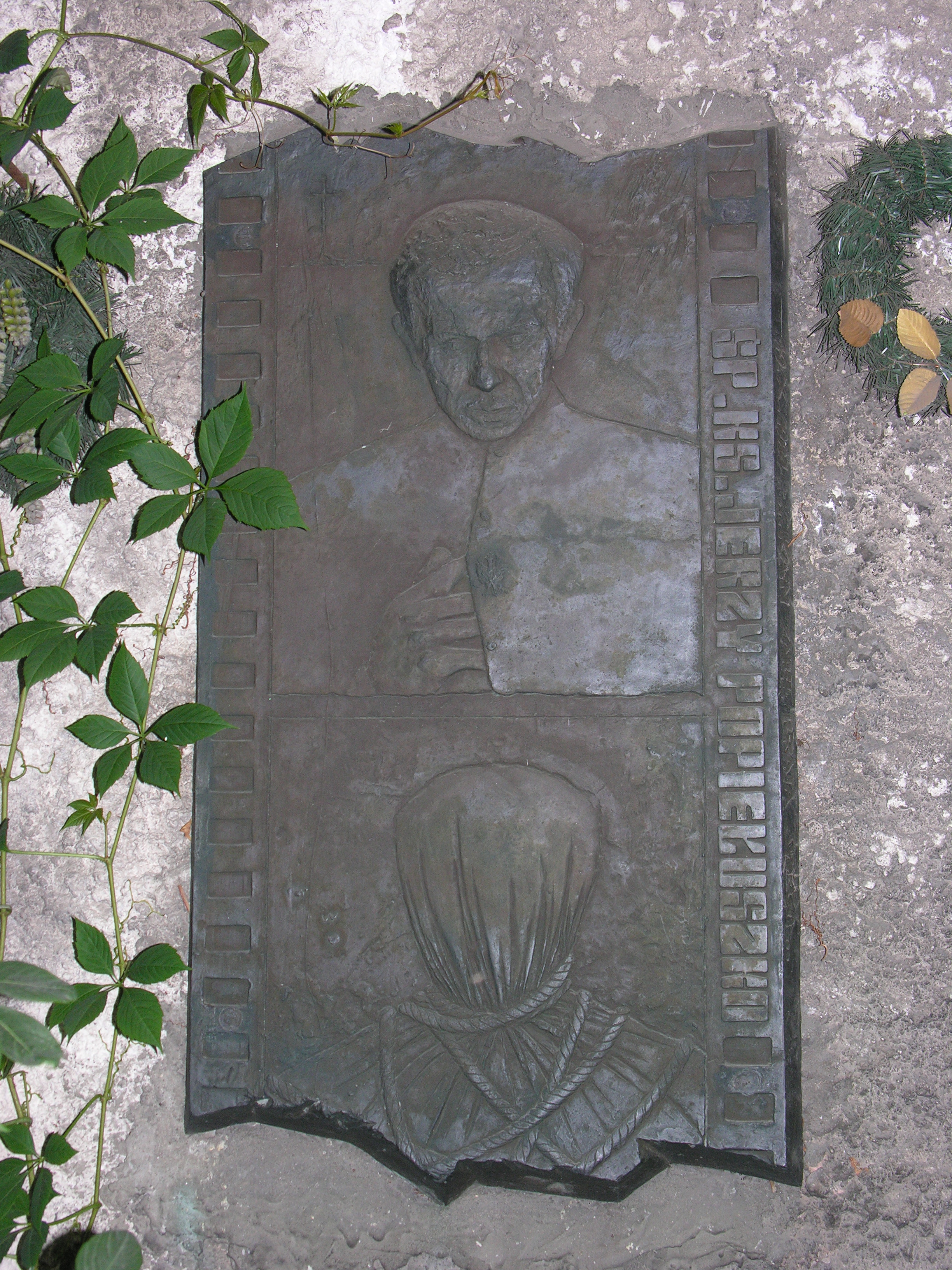 Tablica ku czci ks. Jerzego Popiełuszki we Wrocławiu na kościele św. Wawrzyńca przy ul. Bujwida